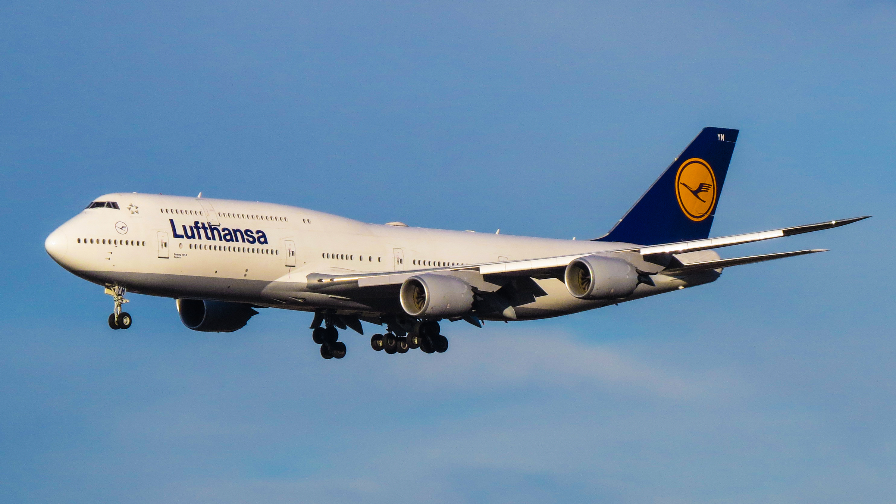 Lufthansa Boeing 747-8